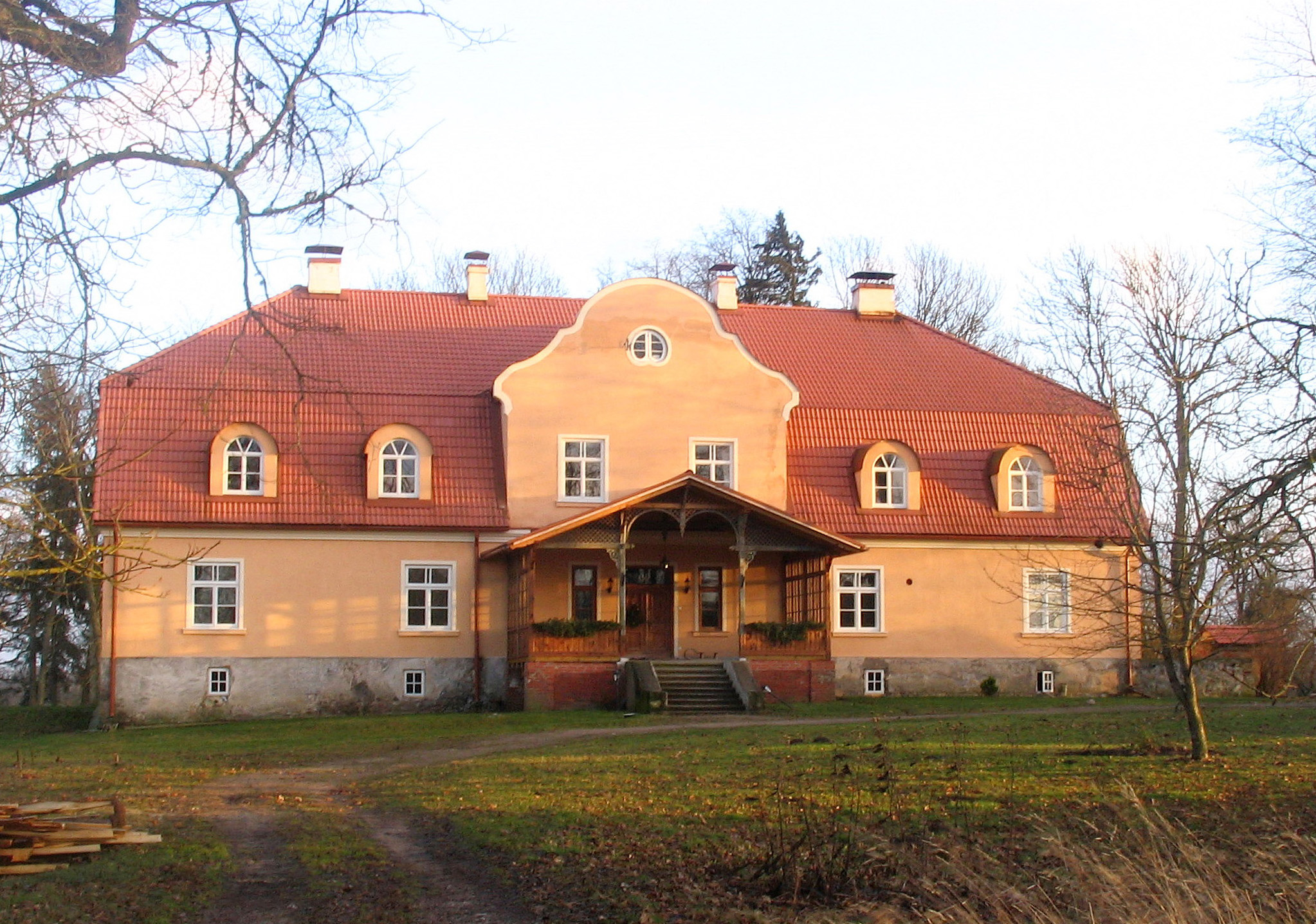 Mara Manor